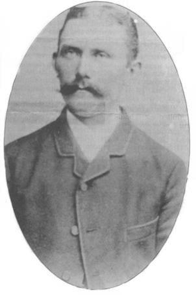 Johann Hinrich Jacobs (*30. August 1863, † 3. Juli 1941), Schiffszimmermann und Namensgeber der Jacobs-Werft in Moorrege. Seine letzte Ruhe fand er auf ehemaligen Alten Friedhof in Uetersen, dem Cäcilie-Bleeker-Park